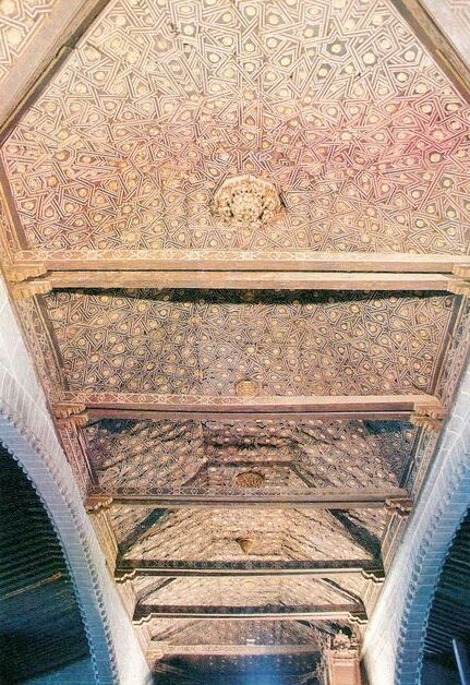 Artesonado mudéjar de la iglesia de Macotera, de estilo mudéjar, antes de su restauración a finales del siglo XX.